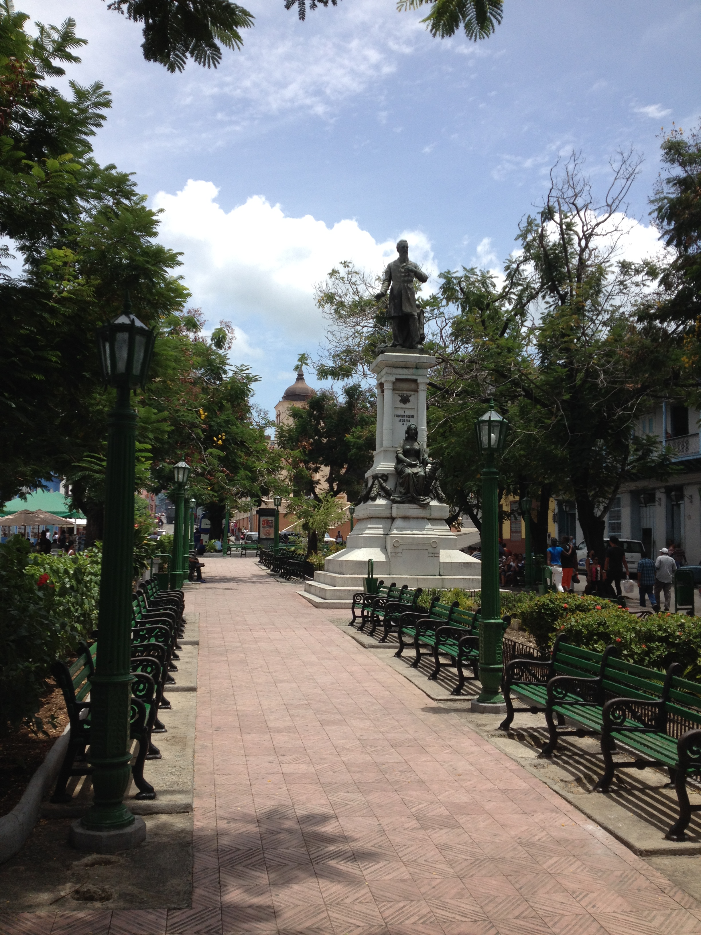 Plaze de Dolores in Santiago de Cuba